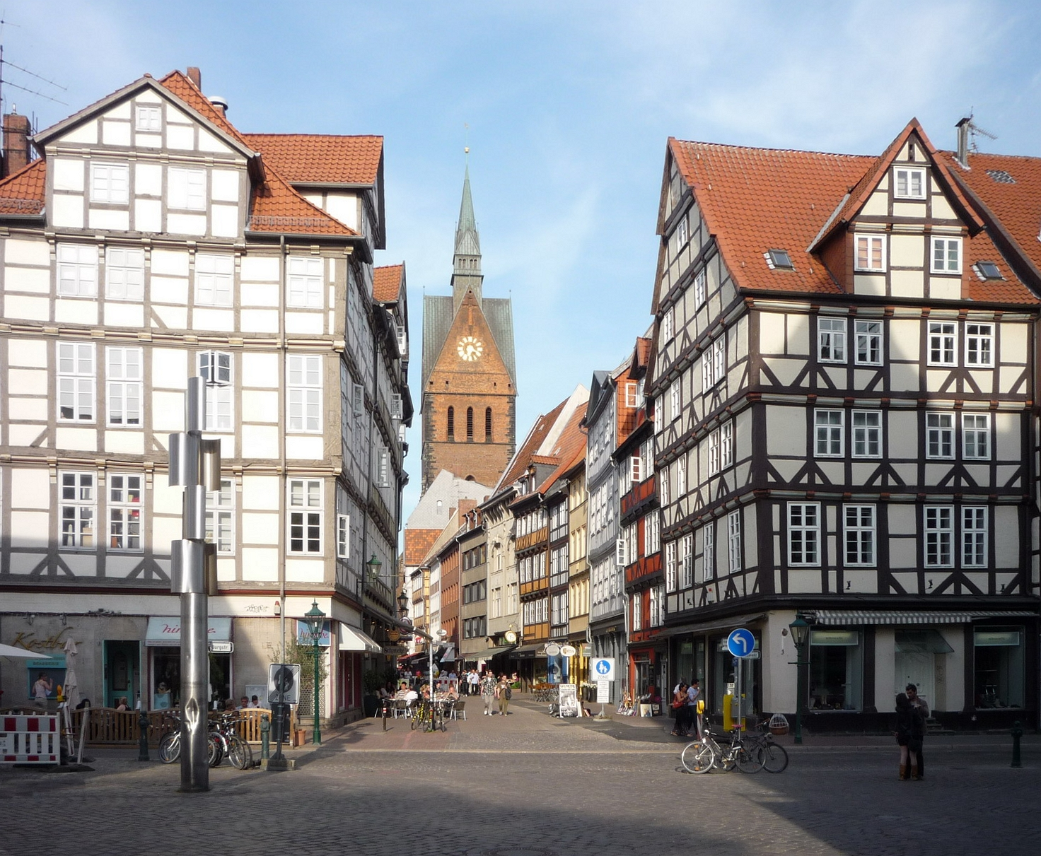 Altstadt in Hannover. Links die Burgstraße, rechts der Holzmarkt. In der Mitte die Kramerstraße, wo am Ende die Marktkirche hervor ragt. Aufgenommen neben dem historischen Museum Hannover.